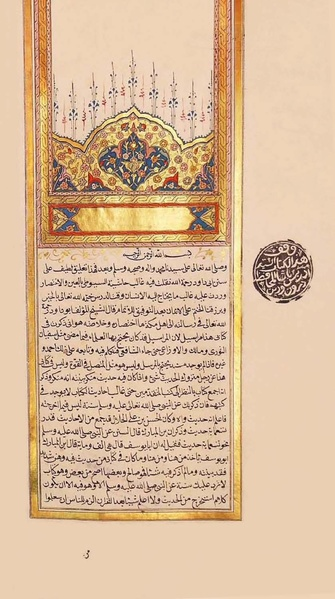 فتح الودود بشرح سنن أبي داود